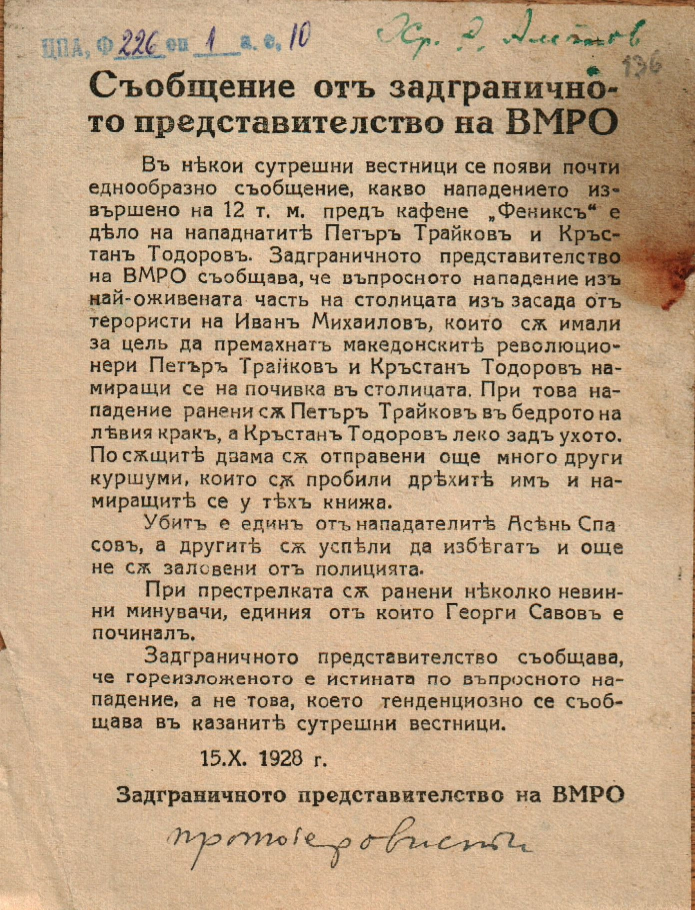 Доклади, изложения, декларации, писма и др. на ВМРО за организационното състояние, характера и дейността на организацията